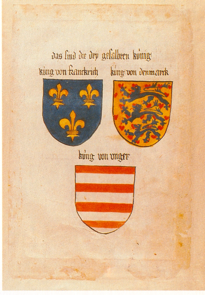 Ingeram-Codex der ehemaligen Bibliothek Cotta das sind die dry gesalbten künig küng von franckrich küng von denmarck küng von unger